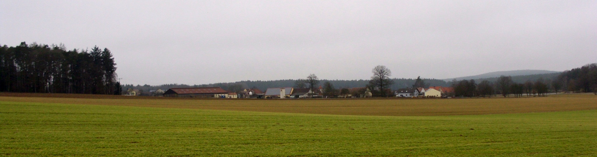 Unterhambach, Ortsteil von Gunzenhausen im mittelfränkischen Landkreis Weißenburg-Gunzenhausen, Bayern.